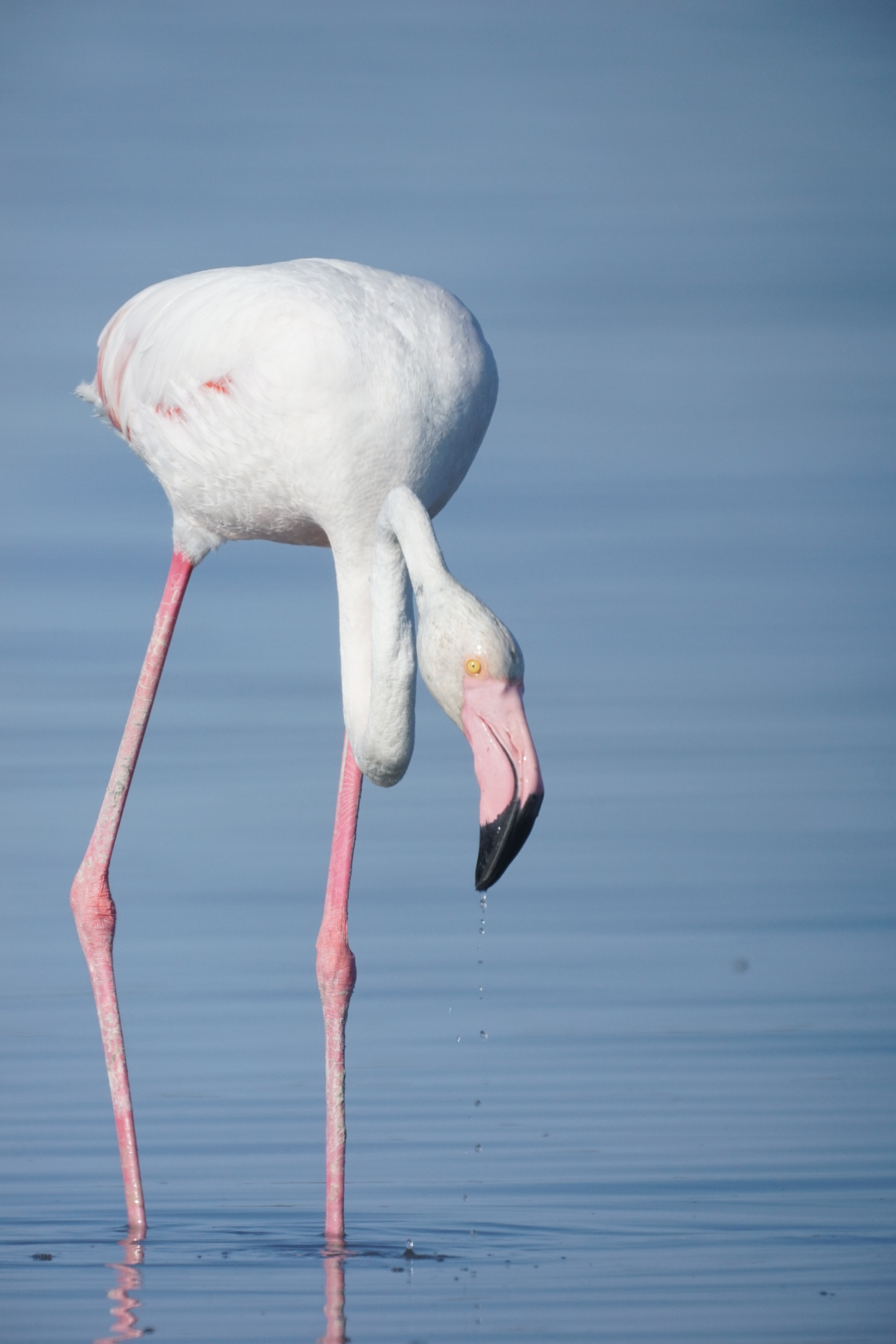 Flamenco europeo en el Paraje Natural de Punta Entinas-Sabinar.